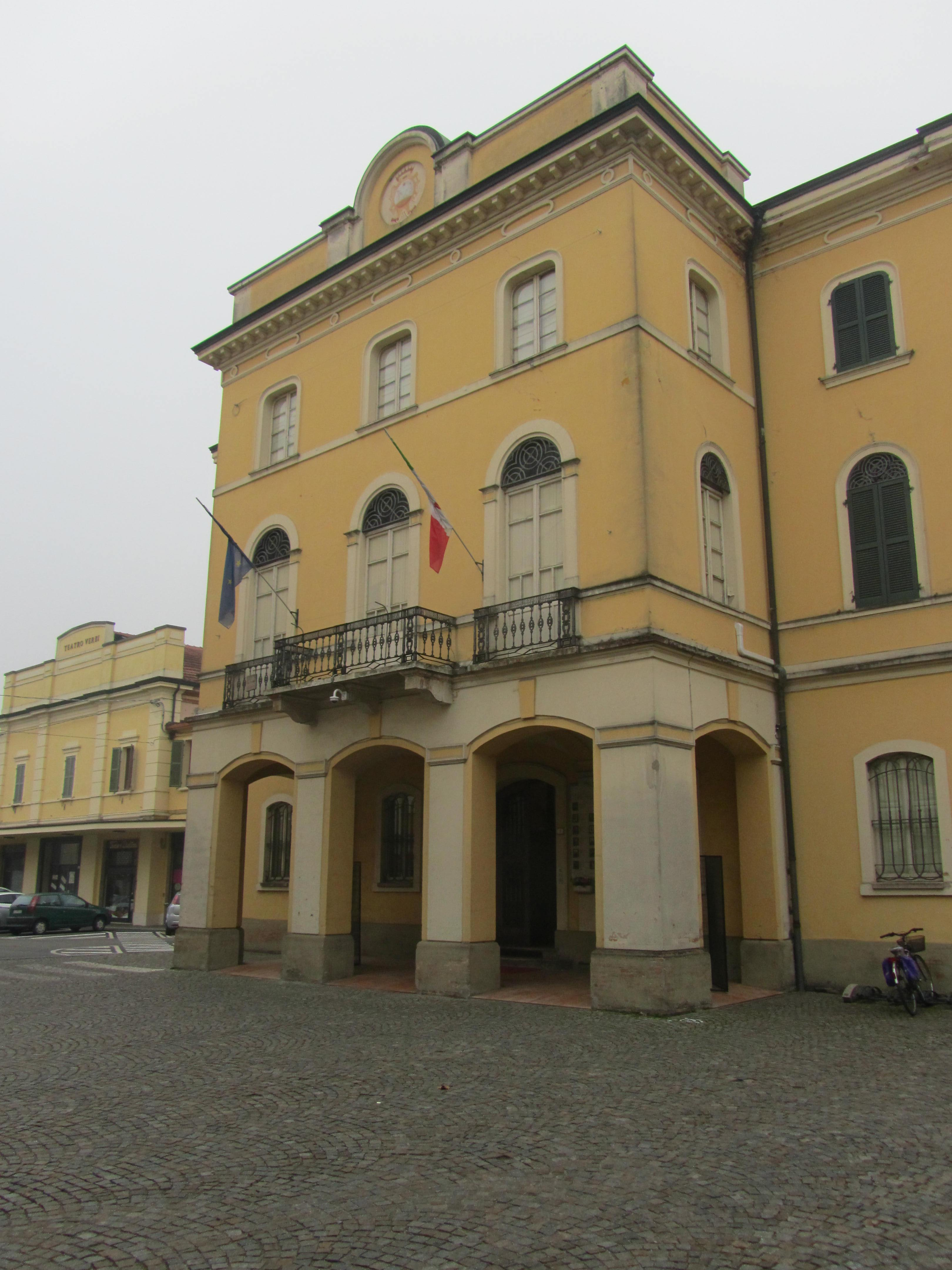 Il municipio di Poviglio, provincia di Reggio Emilia.